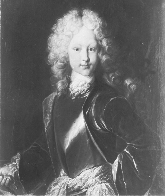 Friedrich Erbprinz von Baden-Durlach (1703-1732).